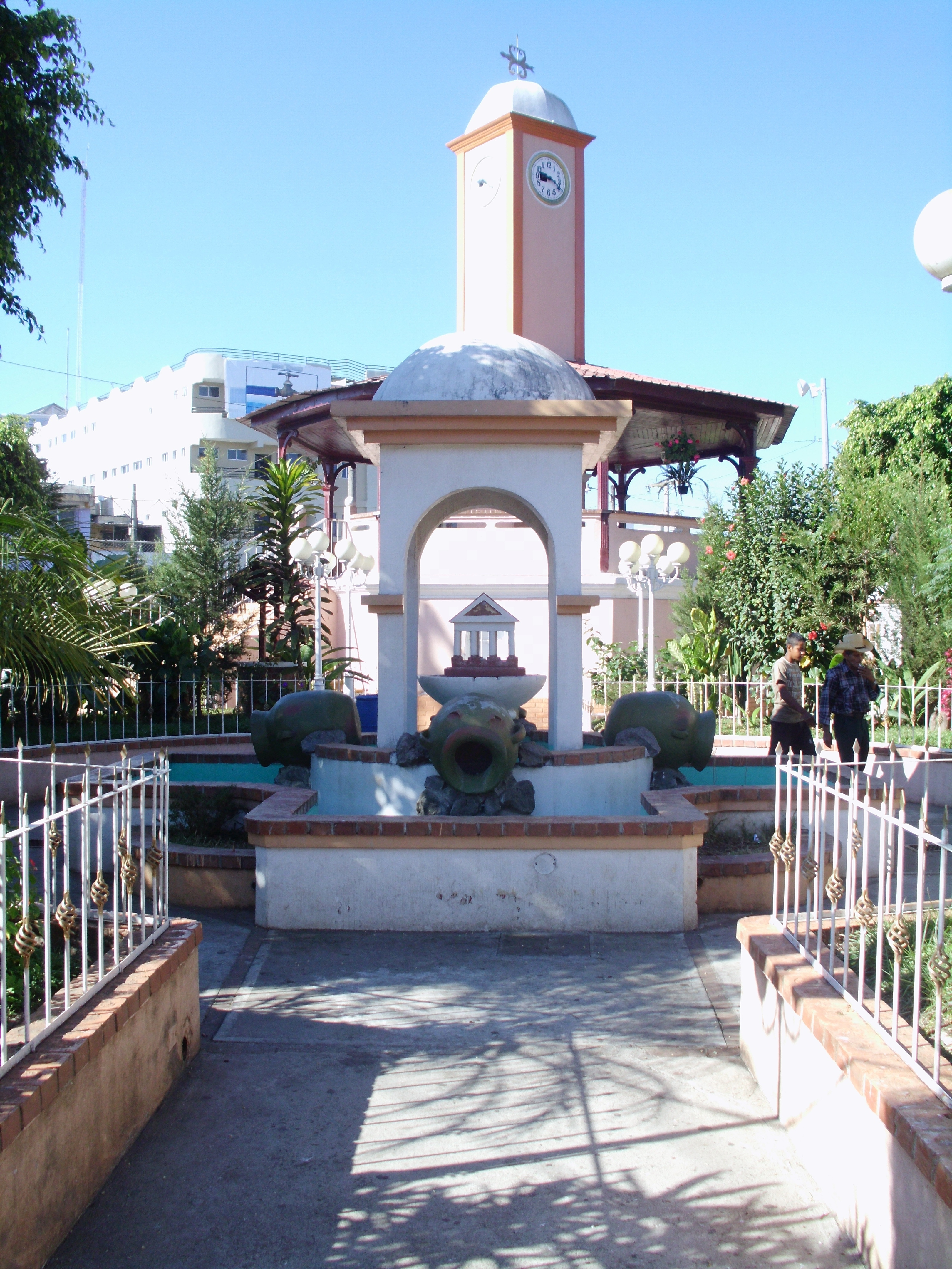 kiosko del parque central de Barberena